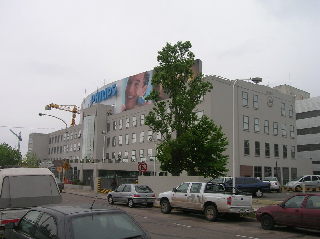 Foto del Barrio de Saavedra, edificio de la Phillips en calle Vedia 3892